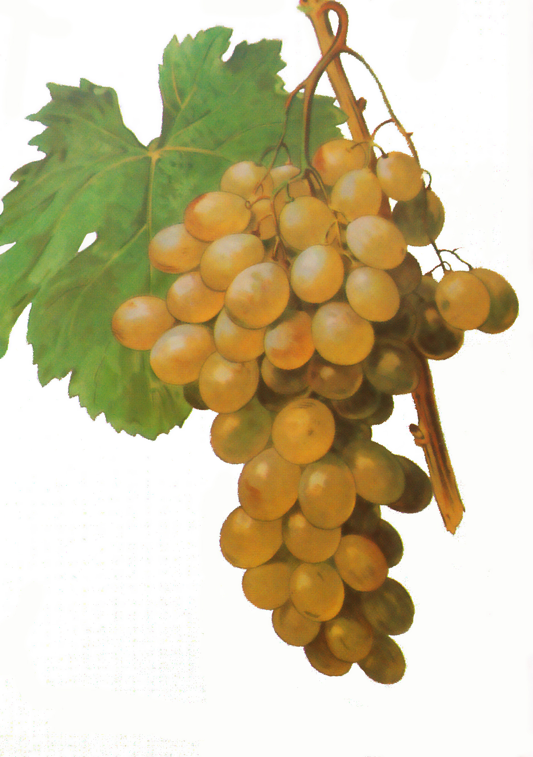 Grappe de Muscat d'Alexandrie par Viala et Vermorel